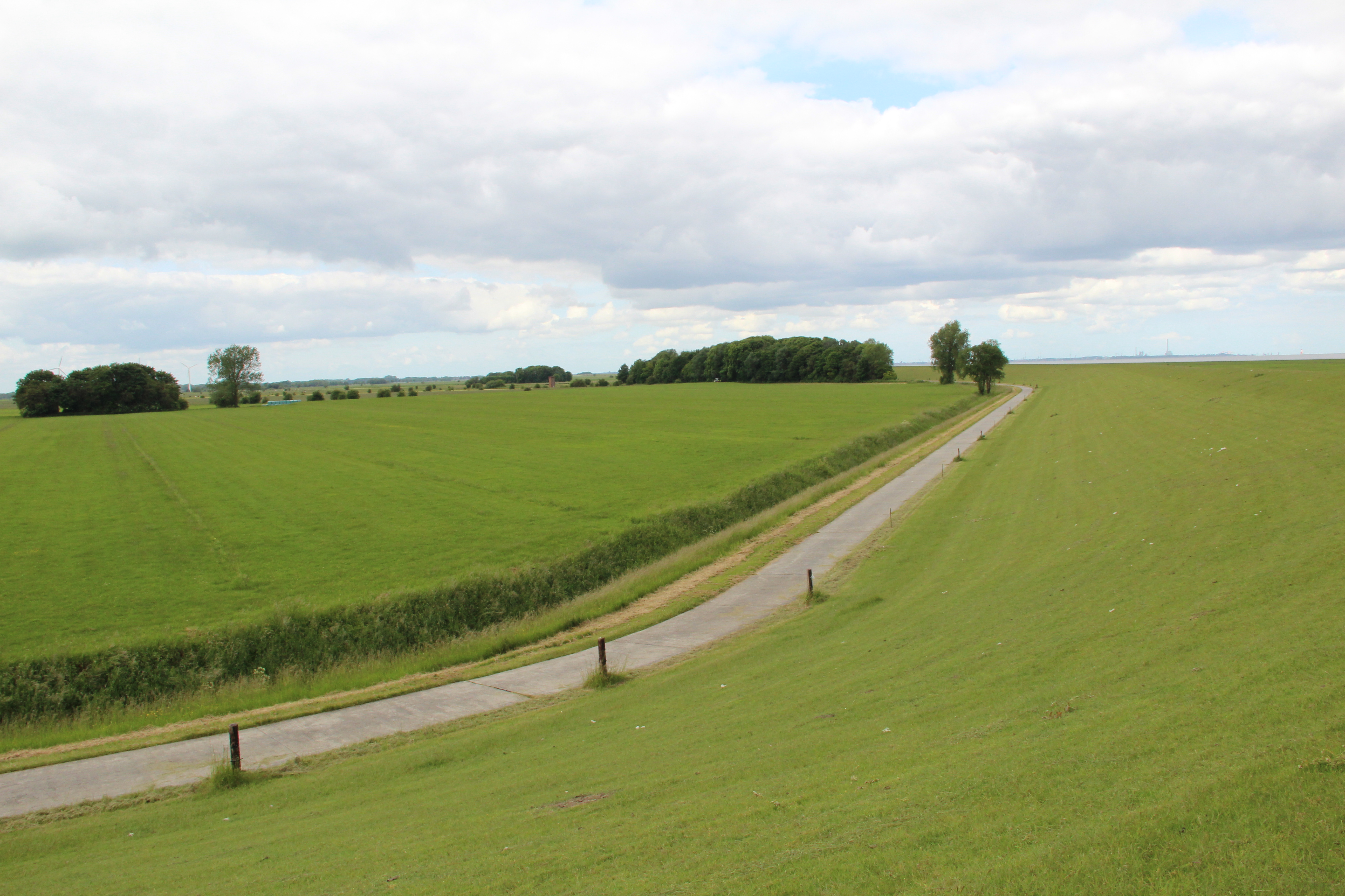 Varel, Hinter dem Deich, Landkreis Friesland, Niedersachsen (2012)